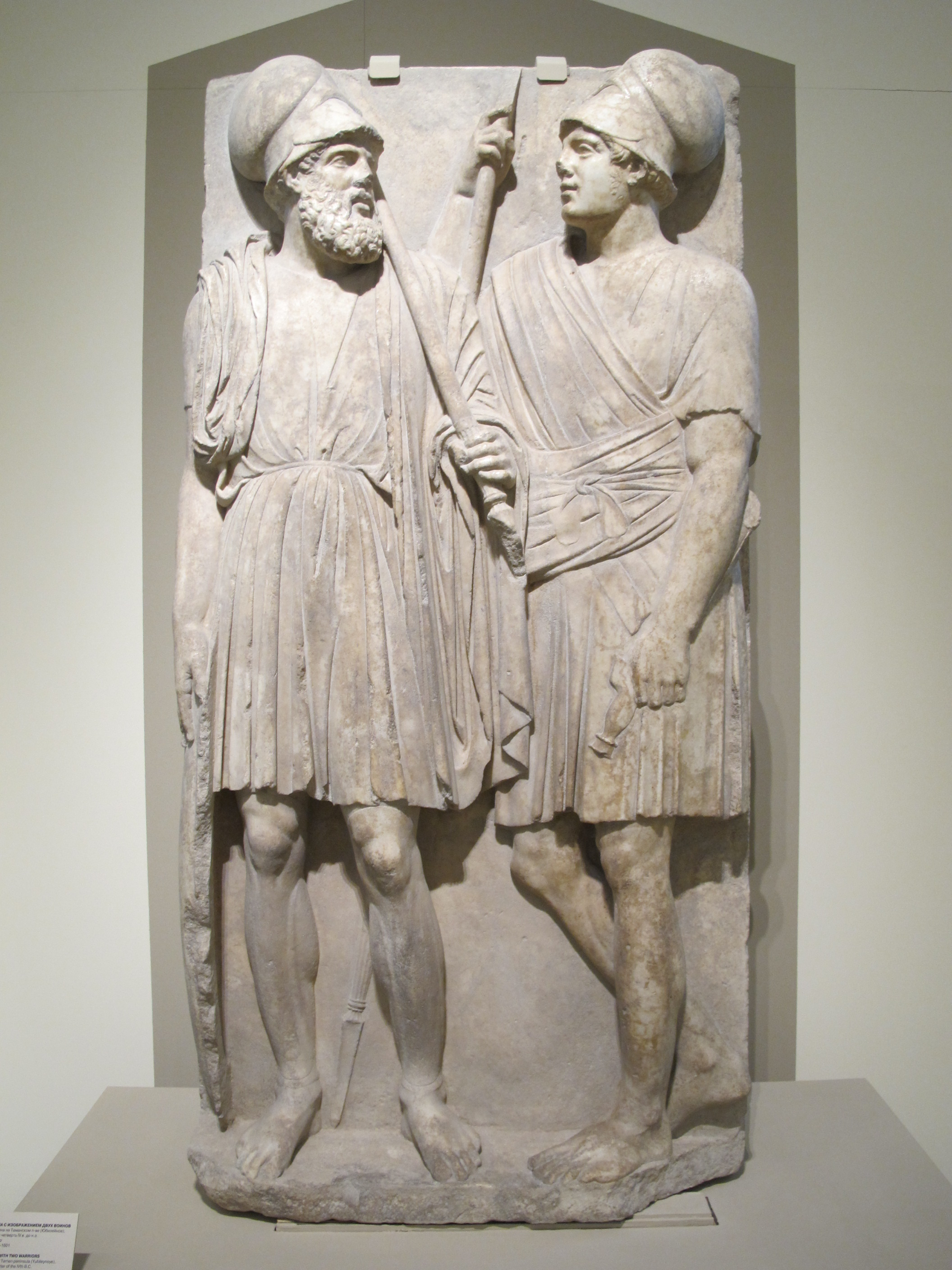 Penisola di taman, stele con due guerrieri, 350-325 ac. ca